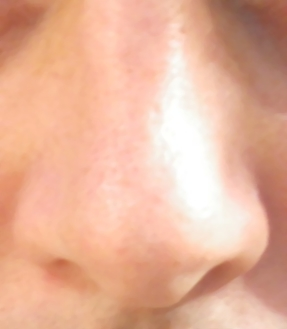 Nez